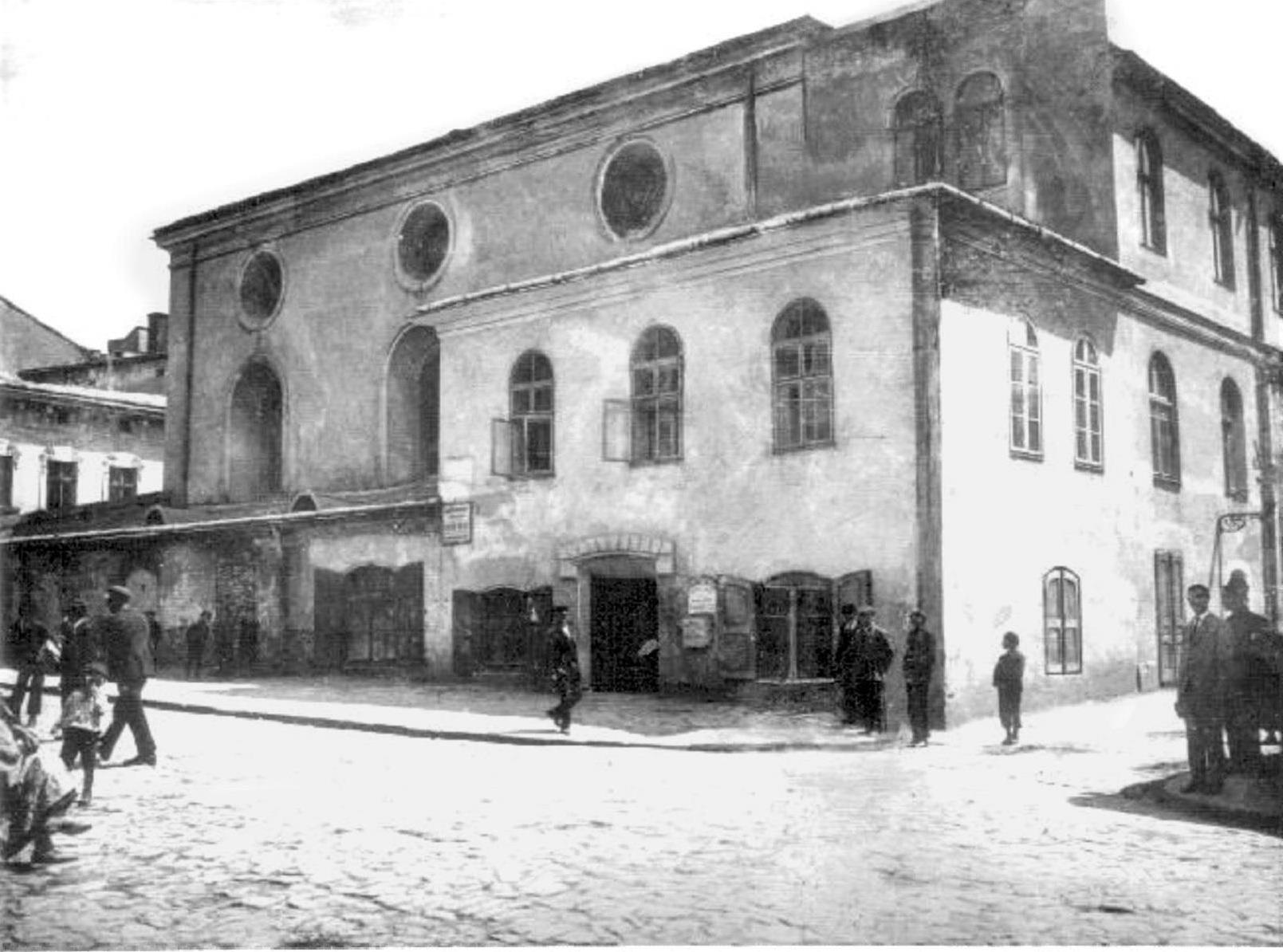 Большая Предместная синагога во Львове, вид с ул. Божничей (Сянской)